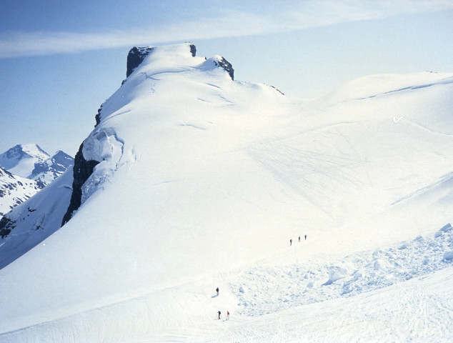 Storebjørn sett fra Bjørnbrean (fra nord). Foto: Marianne Gjørv / Tore Røraas.